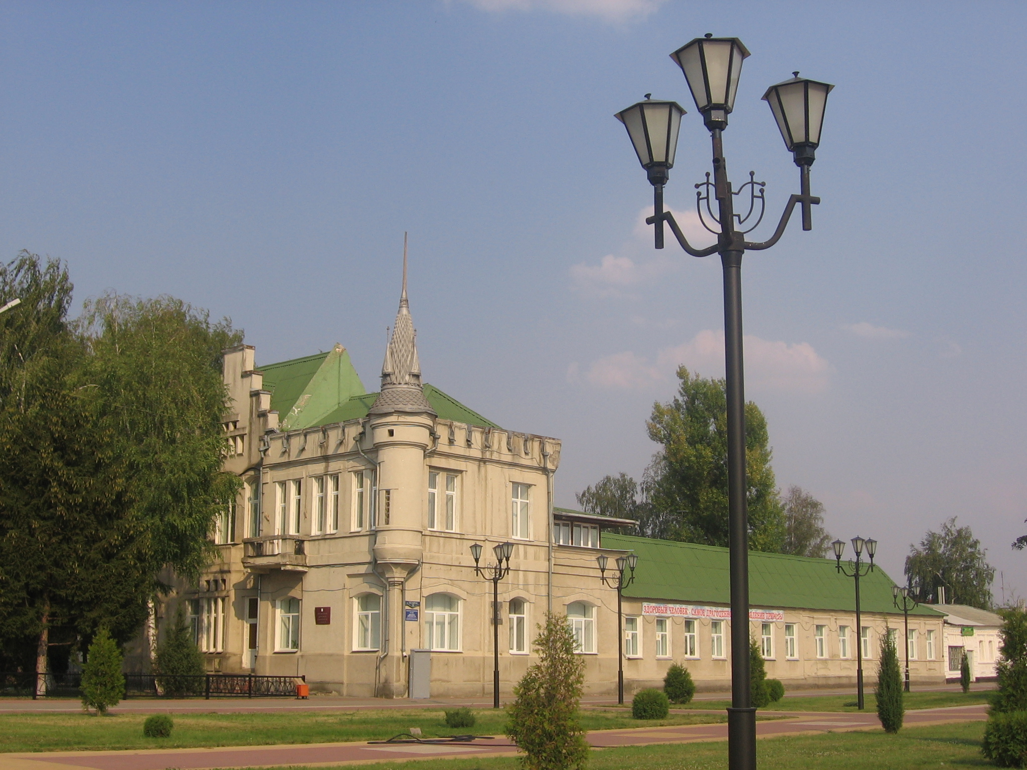 Росія. м. Грайворон. Дитячий ревматологічний санаторій. Колишній будинок купця Дмитрієнко